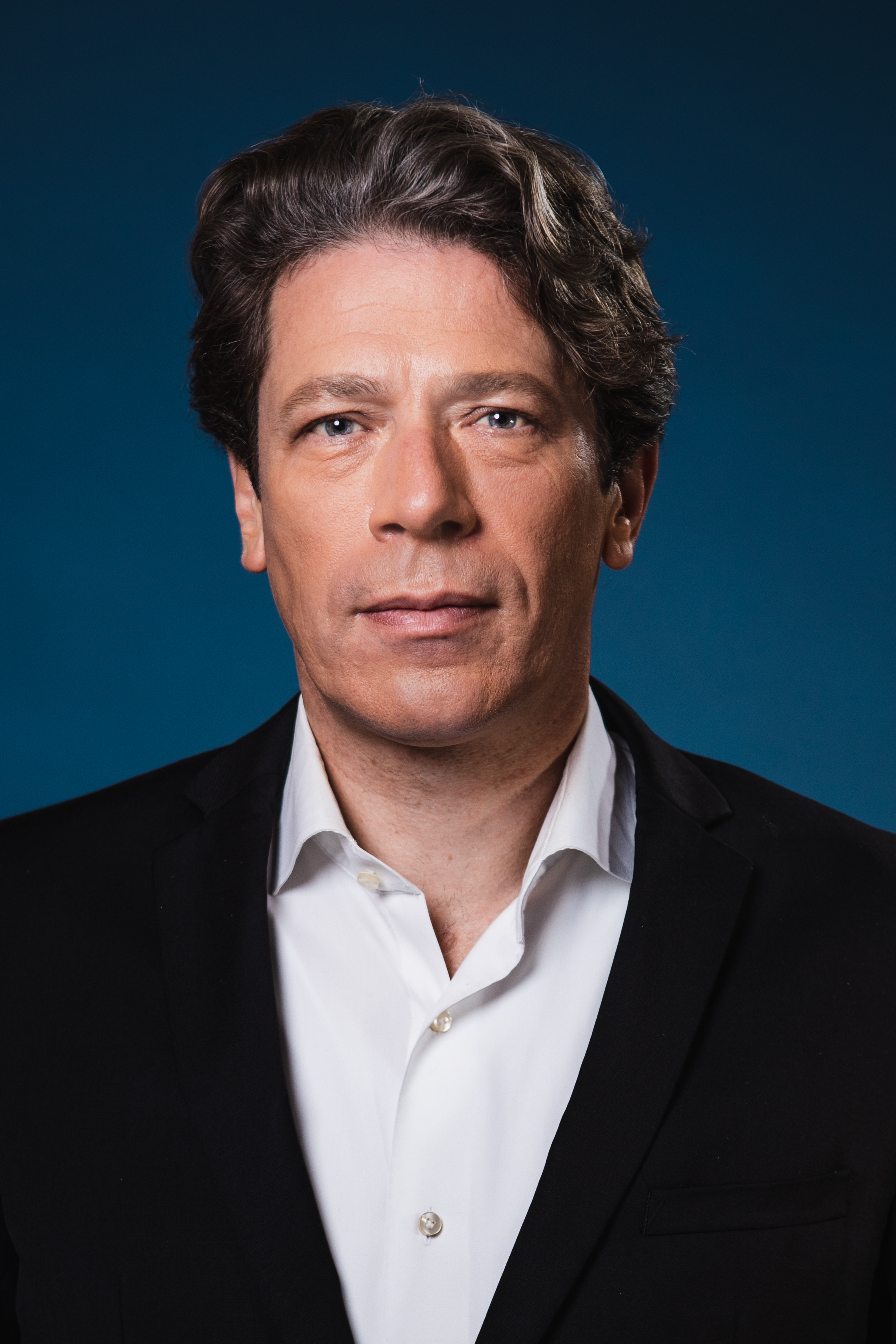 Onze Europarlementariërs